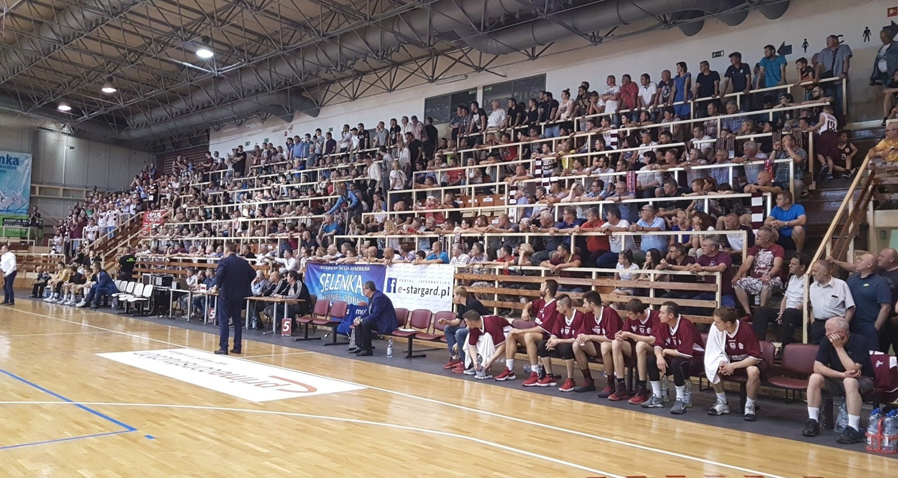 Kibice podczas finału, Spójnia - Sokół (13.05.2018)